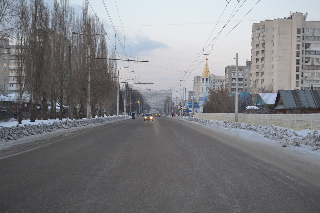 Улица Ферина — улица в Калининском районе Уфы в жилом районе Инорс.